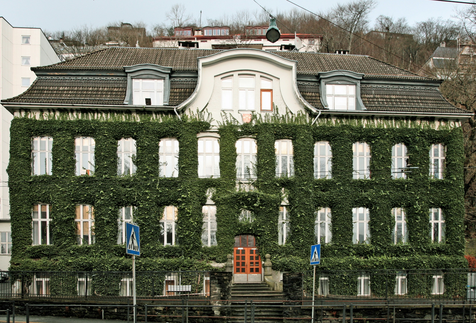 Bergen Handelsgymnasium